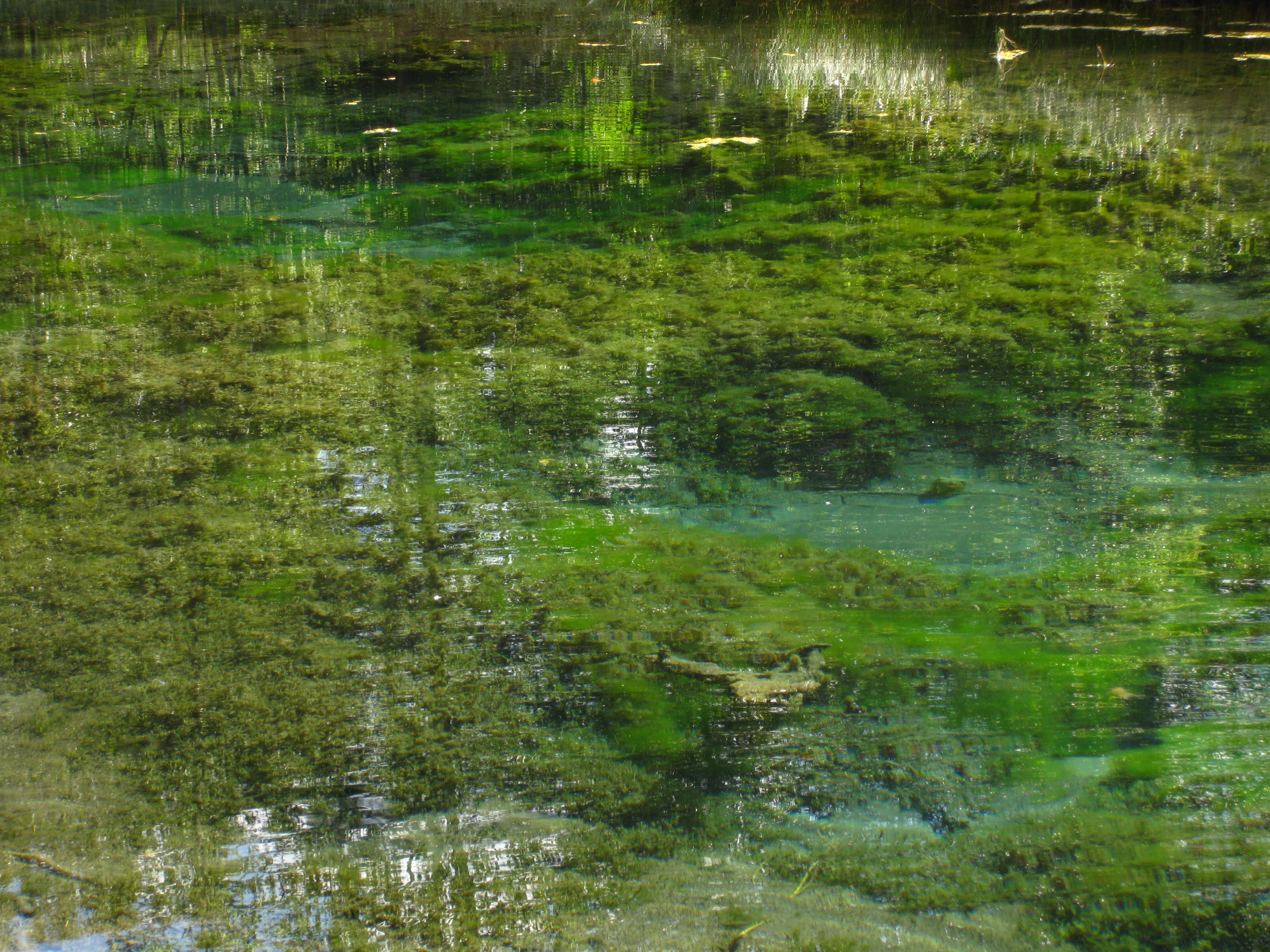 Sinialliku allikad Loodi looduspargis Viljandimaal